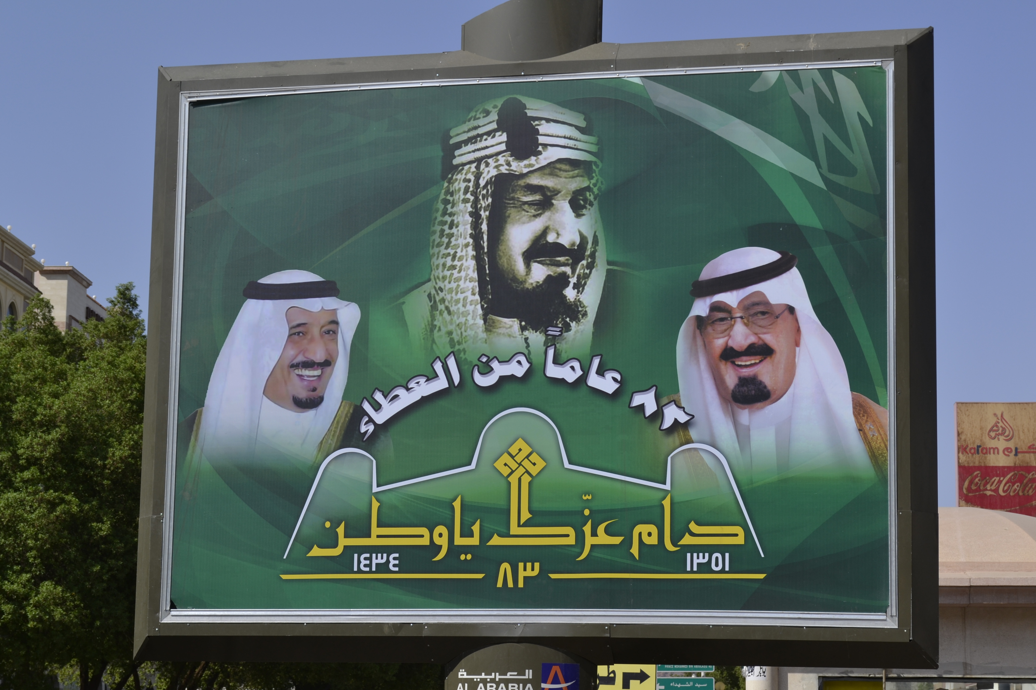 Baliho Hari Nasional Arab Saudi